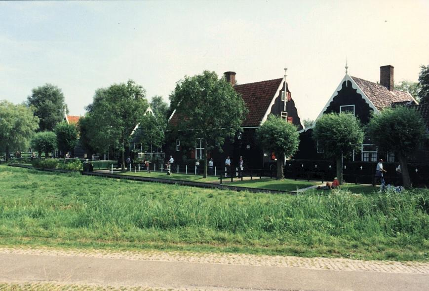 Zaanse Schans village in Netherland